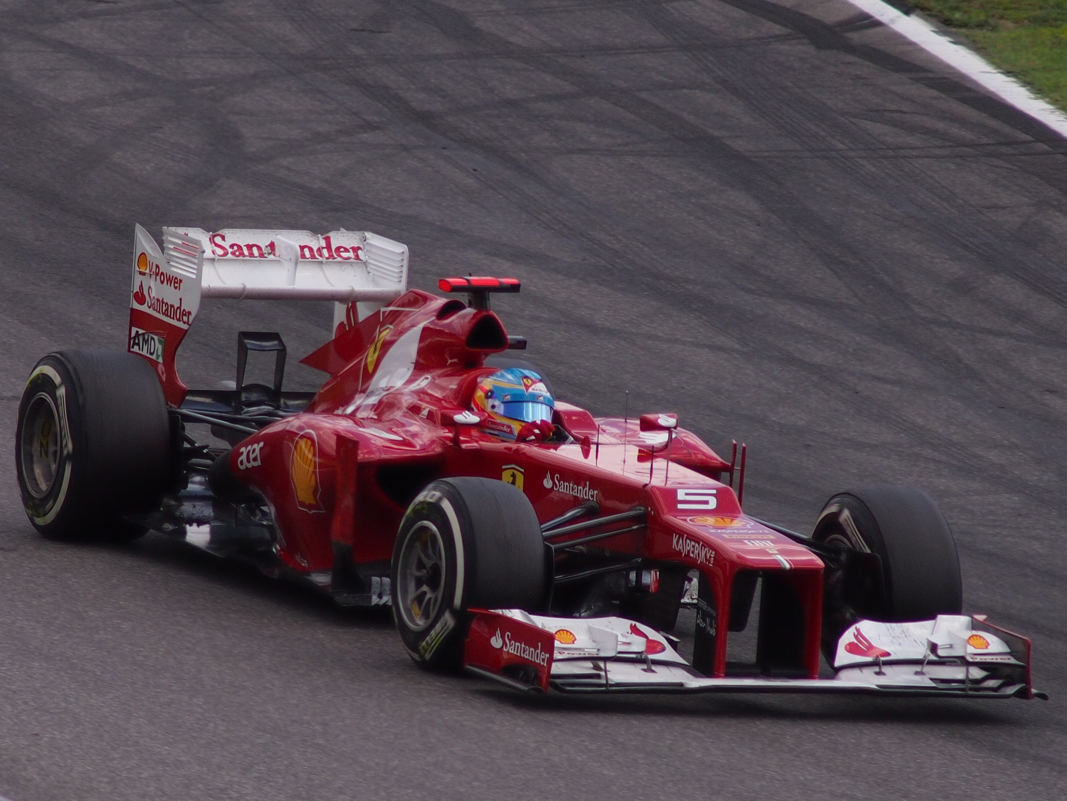 Alonso